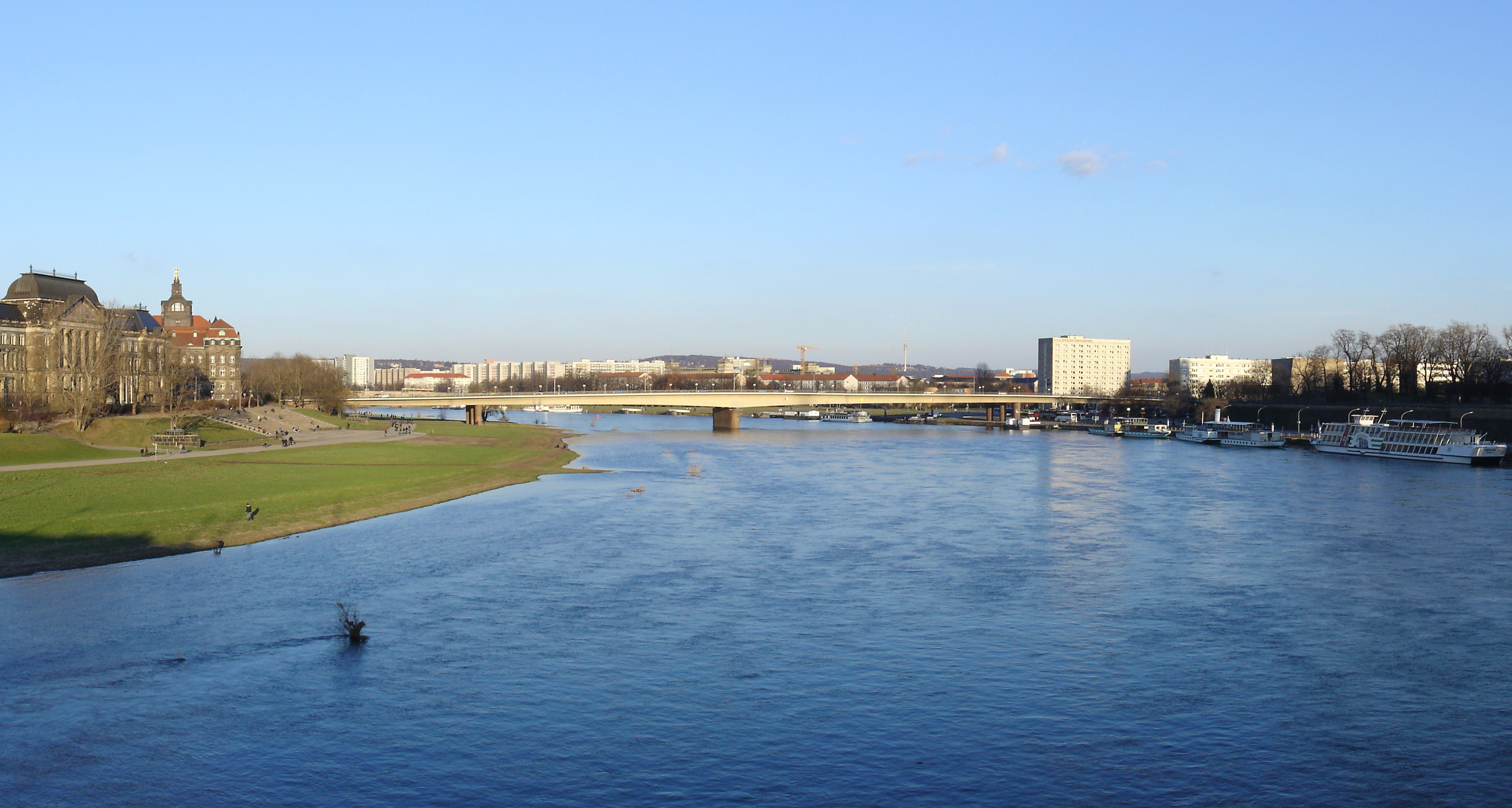 Dresden: Carolabrücke von der Augustusbrücke her gesehen, links: Finanzministerium, rechts: Weiße Flotte und Kunstakademie